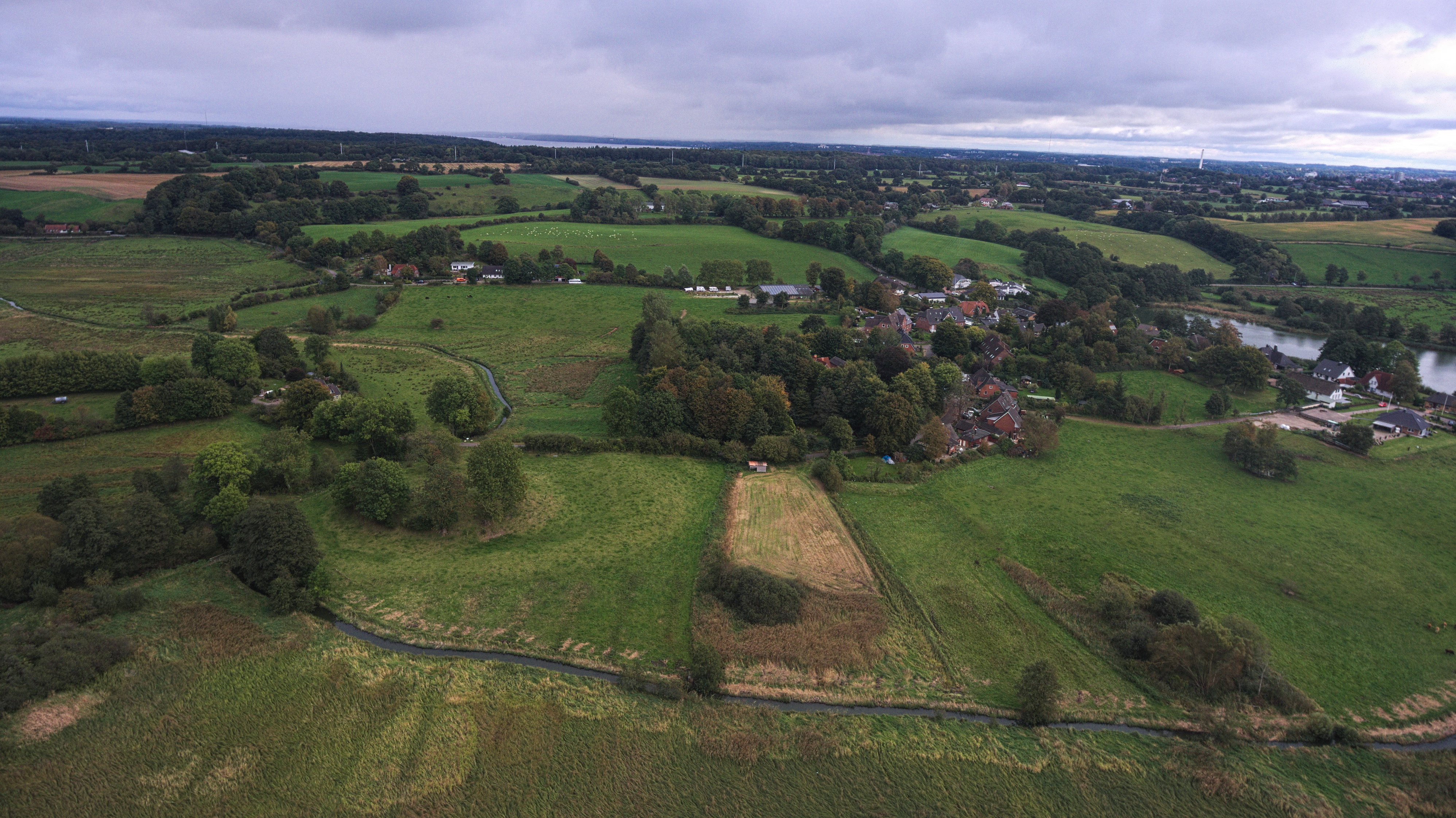 Blick von der Burgruine Niehuus Richtung Flensburger Förde.